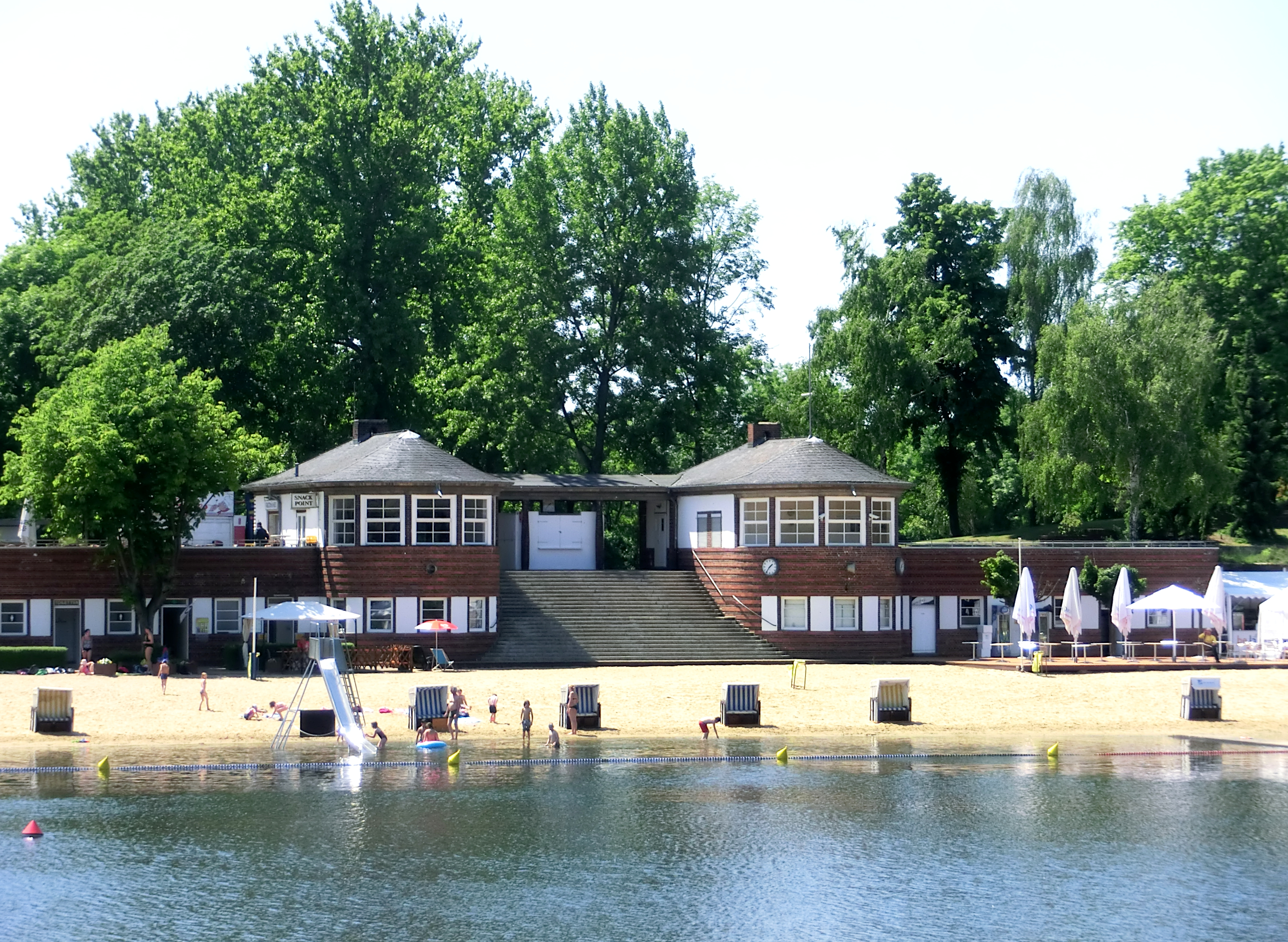 Eingangsgebäude des Strandbads Plötzensee in Berlin, gebaut 1926-1928 nach Plänen von Walter und Johannes Krüger.